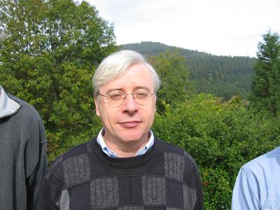 Foto di Martin Brokate